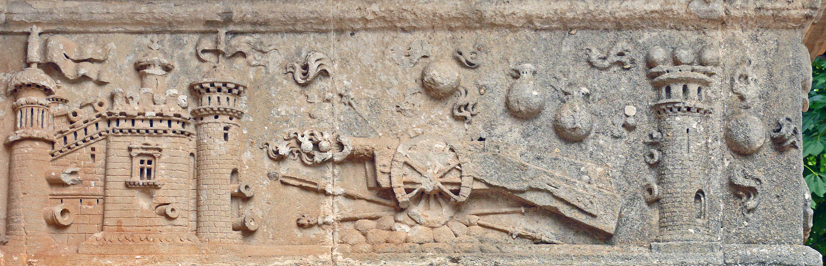 Assier - Frise sculptée de l'église Saint-Pierre - Combat d'artillerie avec une forteresse battue par un canon